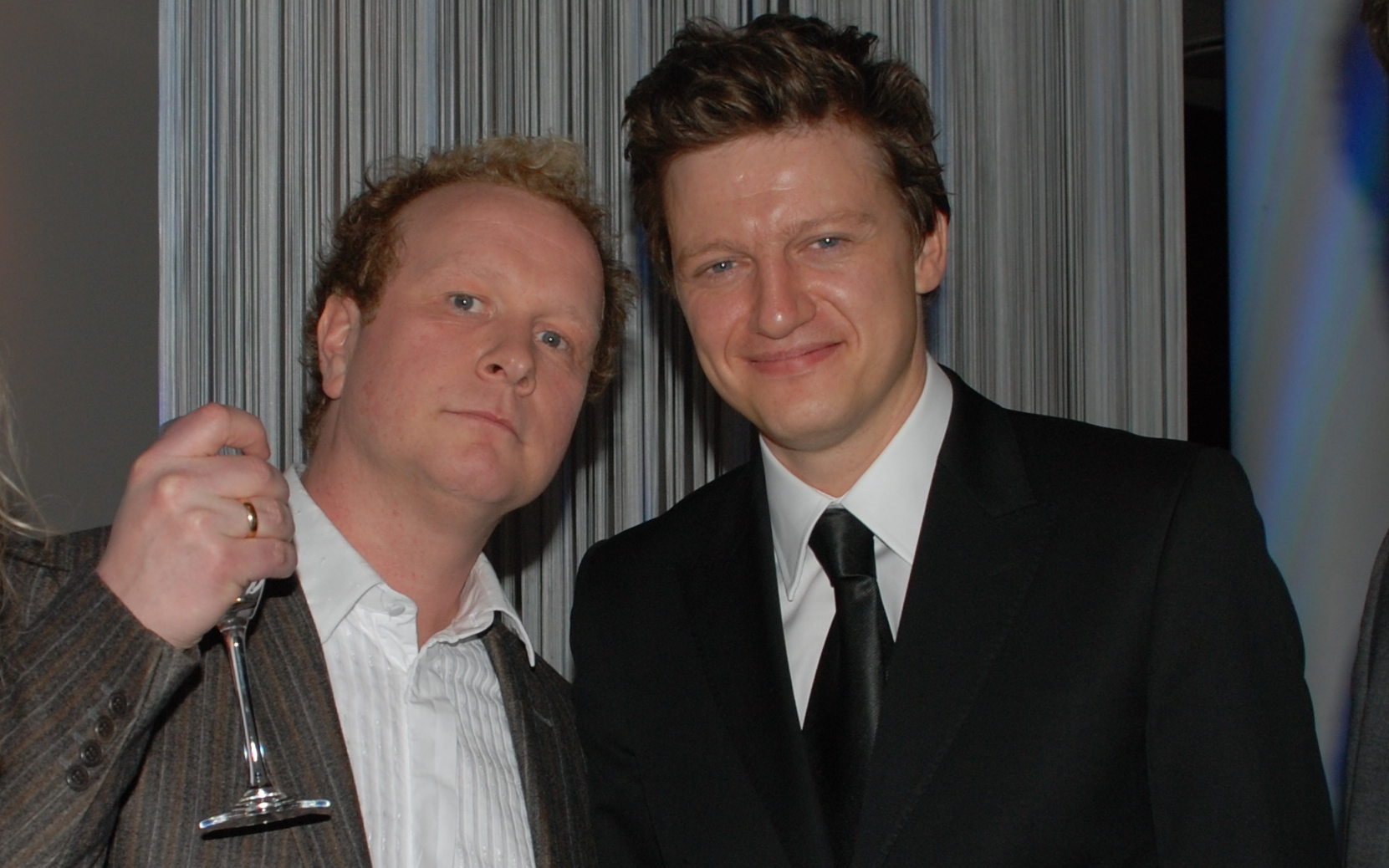 Sveinn og Halldór á Edduverðlaununum árið 2007